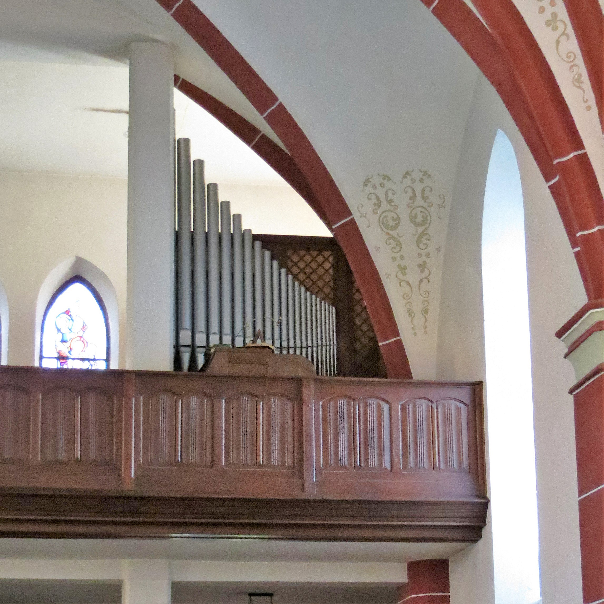 Prospekt der Klais-Orgel in der katholischen Pfarrkirche Herz Jesu in Münchwies, einem Stadtteil von Neunkirchen/Saar.